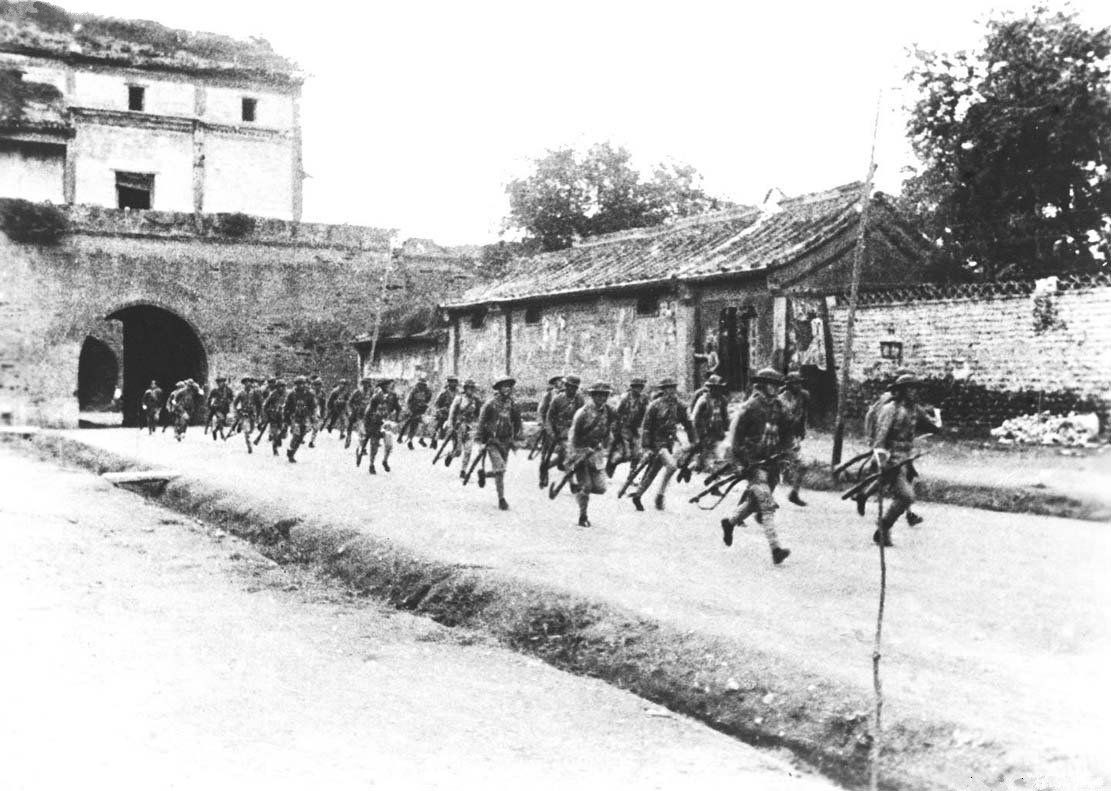 國軍士兵跑出宛平城奔向戰鬥崗位。